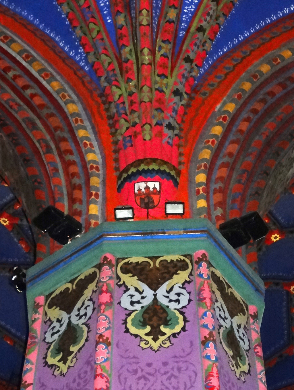 Sklepienia katedry w Bydgoszczy. Modernistyczna polichromia wykonana w latach 1922-1925 przez Henryka Jackowskiego wg projektu Stefana Cybichowskiego.